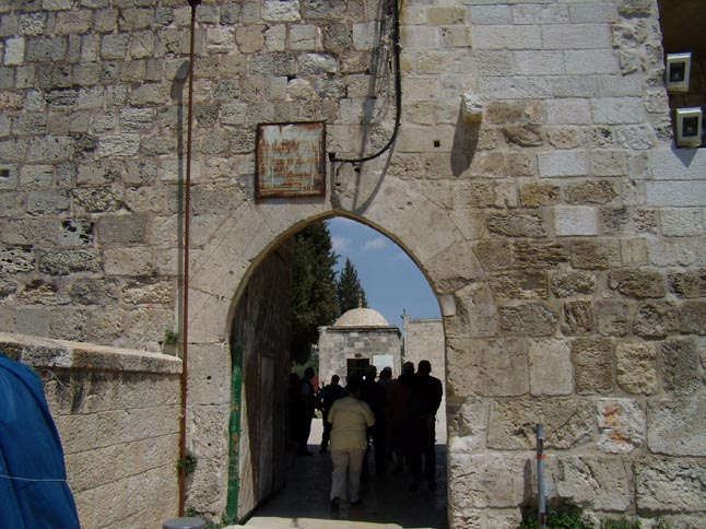 Shaar_mughrabi